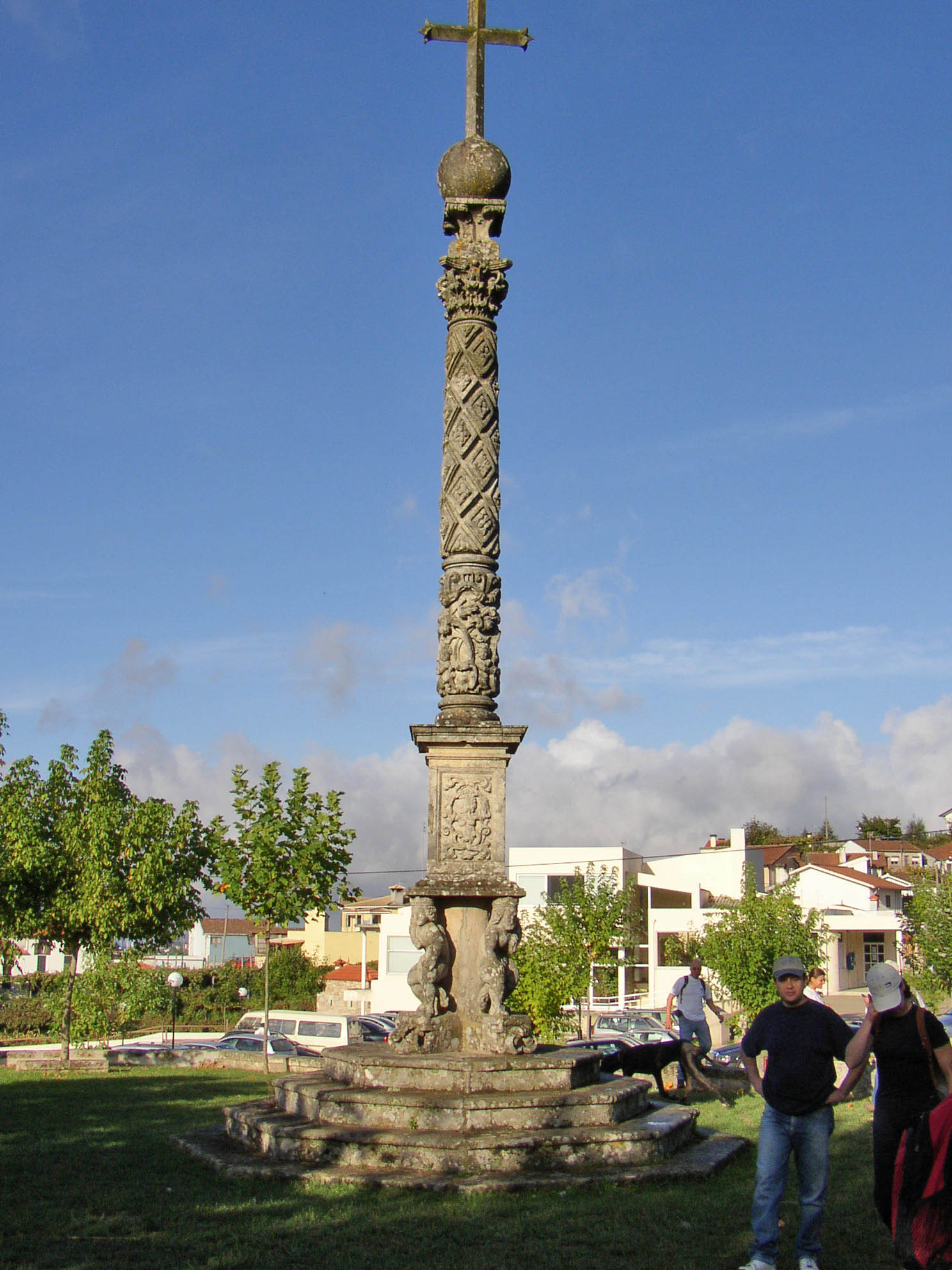 Cruzeiro de Roge